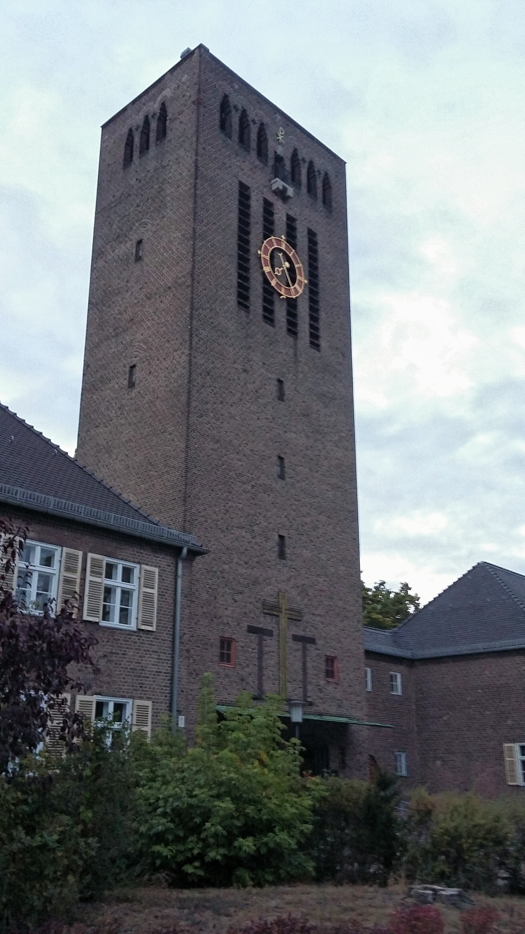 Christophoruskirche (Berlin-Siemensstadt)